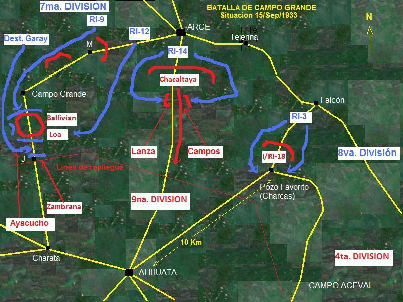 Guerra del Chaco. Batalla de Campo Grande Situacion al 15 de septiembrede 1933.